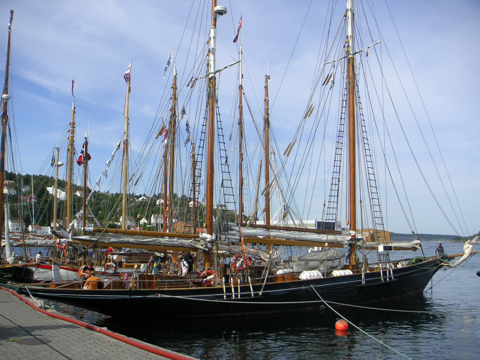 Gratia i Risör, Norge, efter att ha deltagit i Nordisk Seglats 2006, då de kom tvåa.